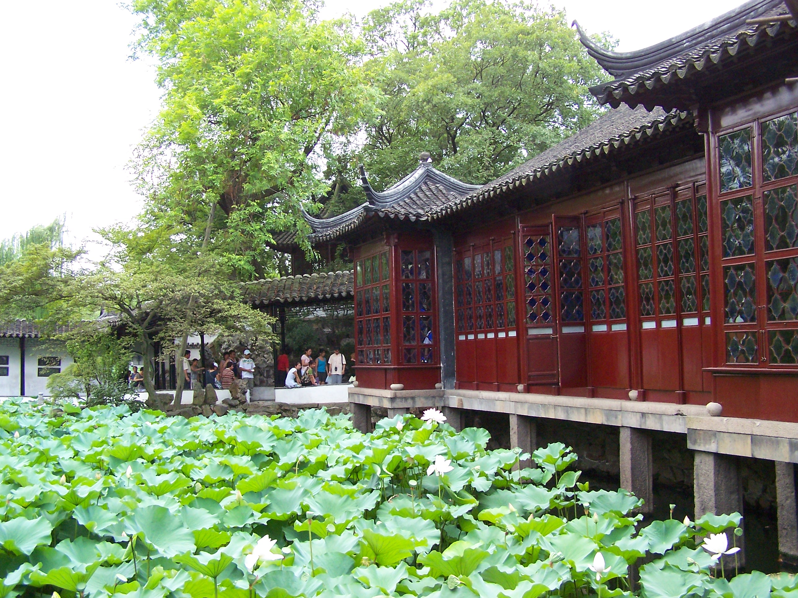 Salle aux Trente-six canards mandarins du Zhuozhengyuan, Suzhou.